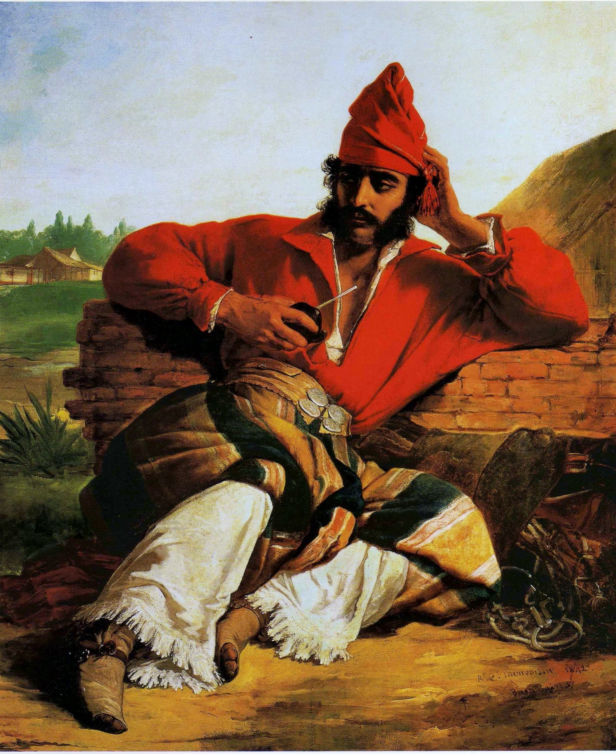 "Este gaucho es una especie de caballero andaluz, que al mismo tiempo recuerda a algunas de las composiciones que Delacroix realizó en sus incursiones por Tánger y Argel. El personaje se supone que es un miembro de La Mazorca que monta guardia en la casa de Rosas en Palermo de San Benito. La actitud es displicente y está reclinado sobre un muro de ladrillos, apoyado sobre los aperos del caballo y ligeramente en escorzo. La mano derecha sostiene el mate, calza botas de potro y aún lleva puestas las espuelas. El color rojo de la chaqueta y del gorro, además de ser el color federal, sirve para poner en evidencia el chiripá y la nota blanca de los calzoncillos cribados. La rastra de cuero muestra el lujo de cuatro monedas de plata, lo que nos da la idea de que su rango no es el de un gaucho raso", ha comentado el pintor Eduardo Iglesias Brickles en La identidad nacional y el gaucho amanerado de Monvoisin .